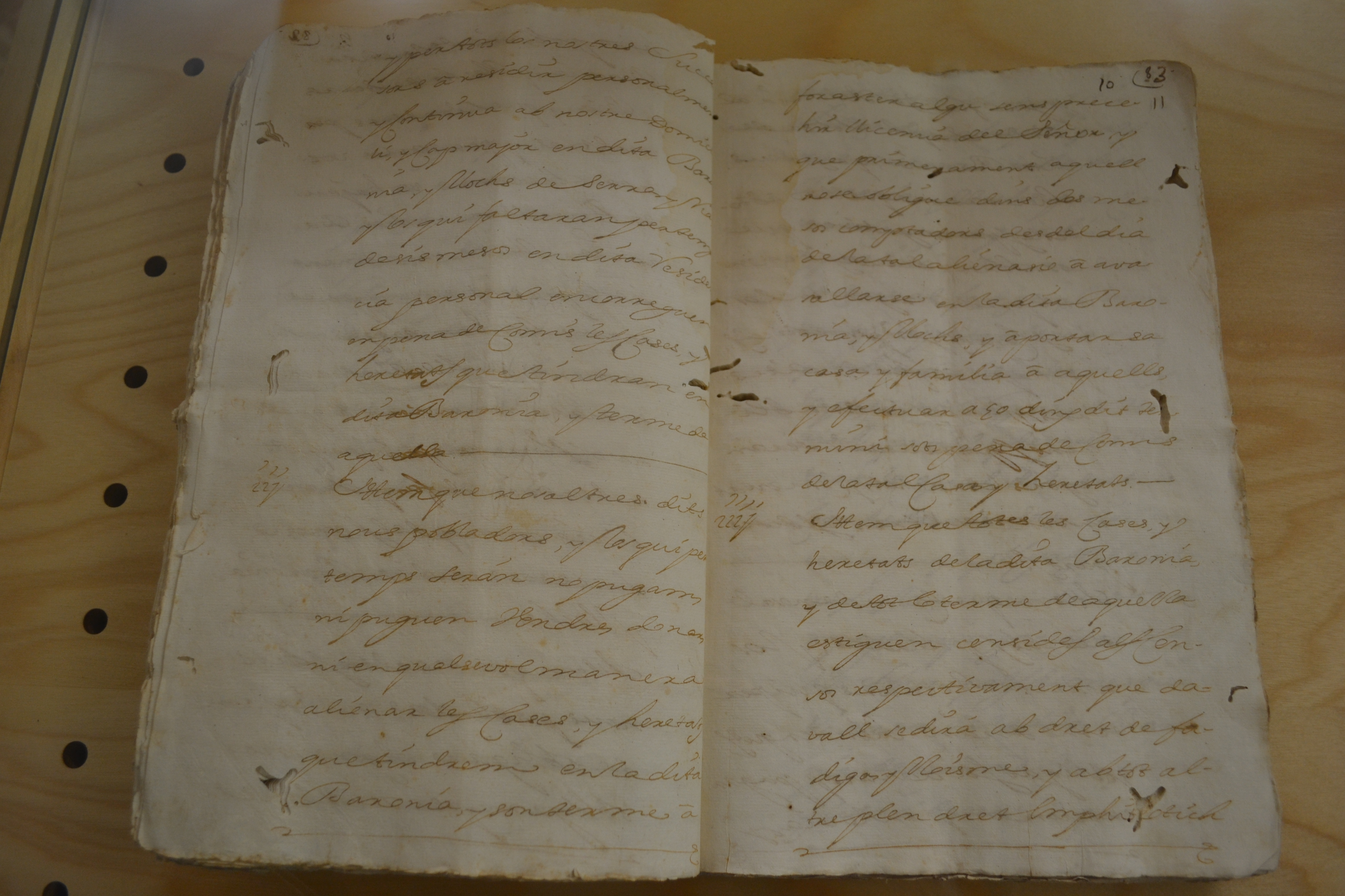 En Josep Folch de Cardona, senyor de Serra, Ria, Soneja i Azuébar, atorga carta pobla per als llocs de Serra i Ria, despoblats per l'expulsió dels moriscos, a fur de València (26 de novembre de 1609). ARV. Escrivanies de Cambra, 1791, exp. 58 (còpia de 22 de desembre de 1740). Arxiu del Regne de València.